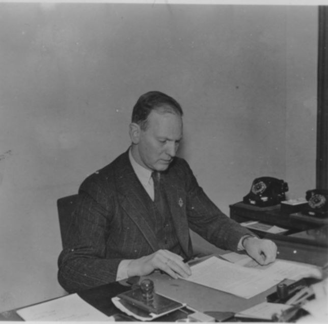 Bildet viser oberst Olaf Helset, som i januar 1945 ble beordret til sjef for det norske reservepolitiet i Sverige med tittelen ”Sjefen for polititroppene”. (Militærattasjeen oberst Ole Berg har dog på vegne av vedkommende myndigheter i Storbritannia den øverste ledelse av polititroppene). Helset var også under en periode norsk flyktningssjef i Sverige. DUBLETT? RA/PA-1209/Uc/65/1-2/S 188